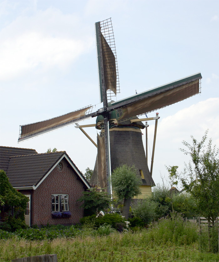 Foto van de graanmolen van Wilnis. Zelf gemaakt.